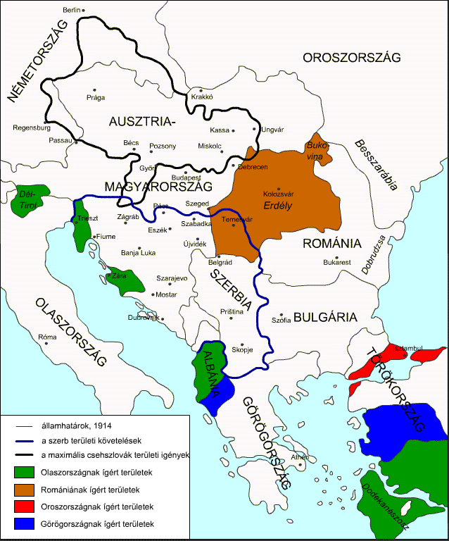 Antant ígéretek és az antant szövetségesek területi követelései.